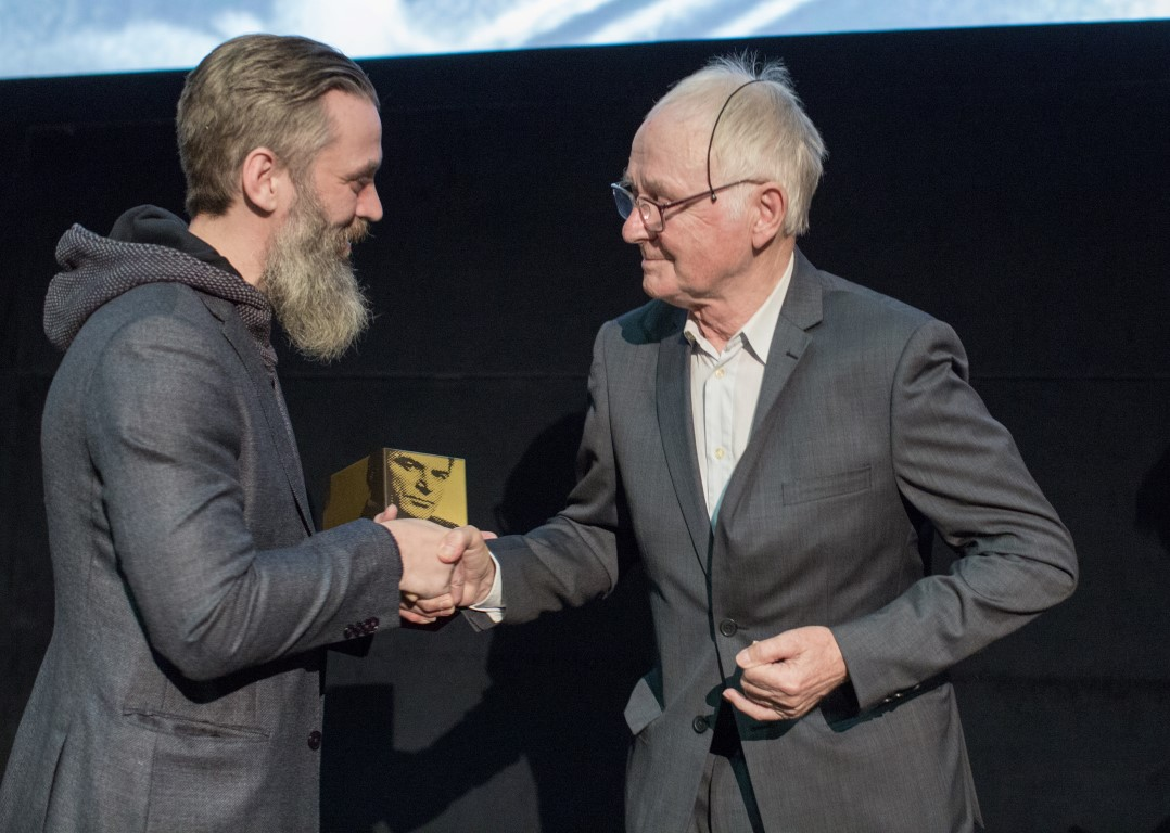 Podelitev nagrade Bert.